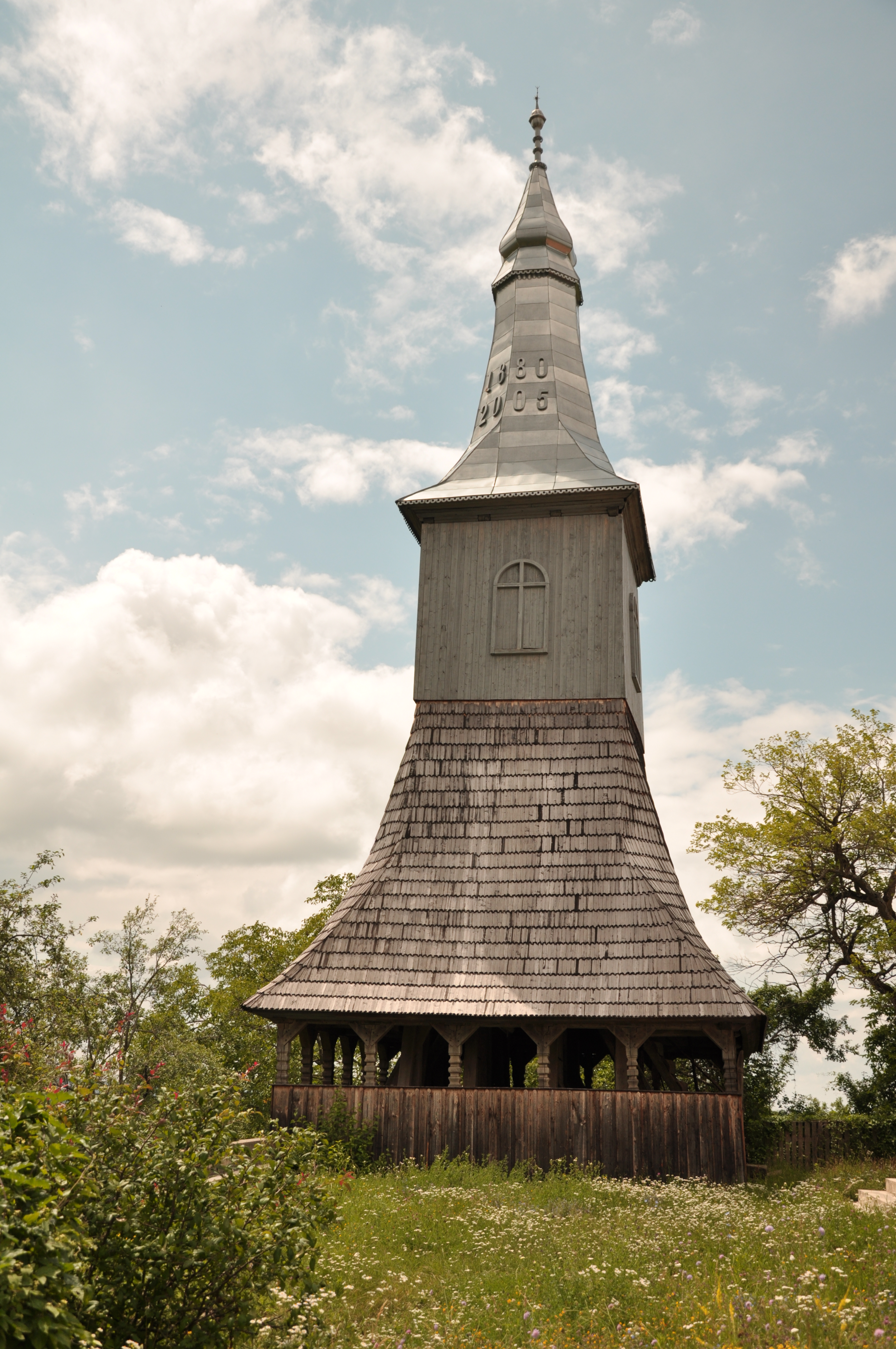 Clopotnița de lemn a bisericii reformate, sat Șiclod; comuna Atid